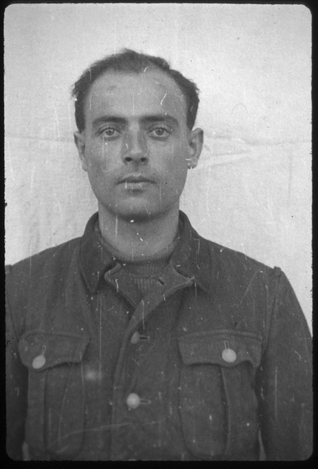 Wilhelm Welter (* 24. Januar 1913 ; † 29. Mai 1946 in Landsberg am Lech) war ein deutscher SS-Hauptscharführer und als Arbeitsdienstführer im KZ Dachau eingesetzt. Welter wurde im Dachau-Hauptprozess zum Tode verurteilt und hingerichtet.